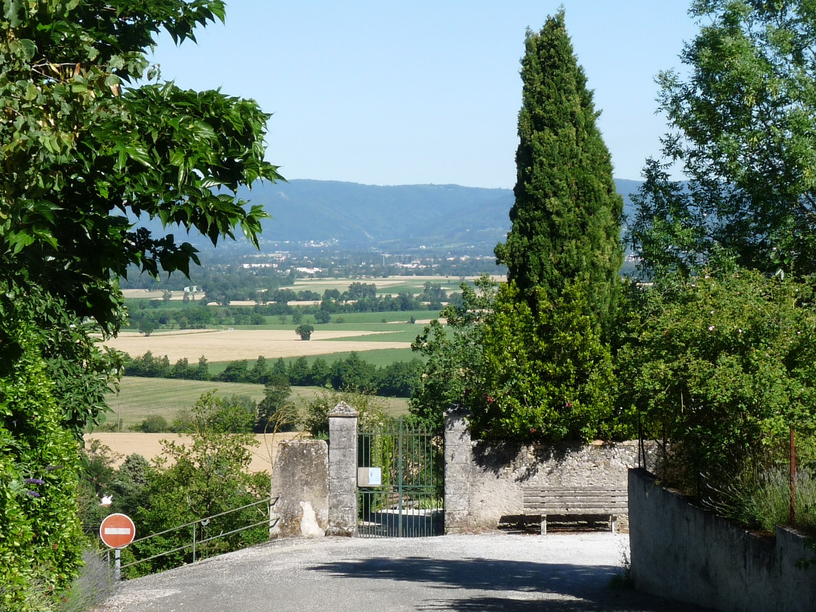 Vue vers la Montagne Noire depuis le cimetière. Nogaret, Haute-Garonne, France